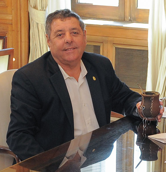 El ministro del Interior, Obras Públicas y Vivienda, Rogelio Frigerio, recibió esta mañana en su despacho de Casa Rosada al senador nacional Alfredo de Angeli y a la diputada nacional Yanina Gayol, ambos representantes de Entre Ríos.